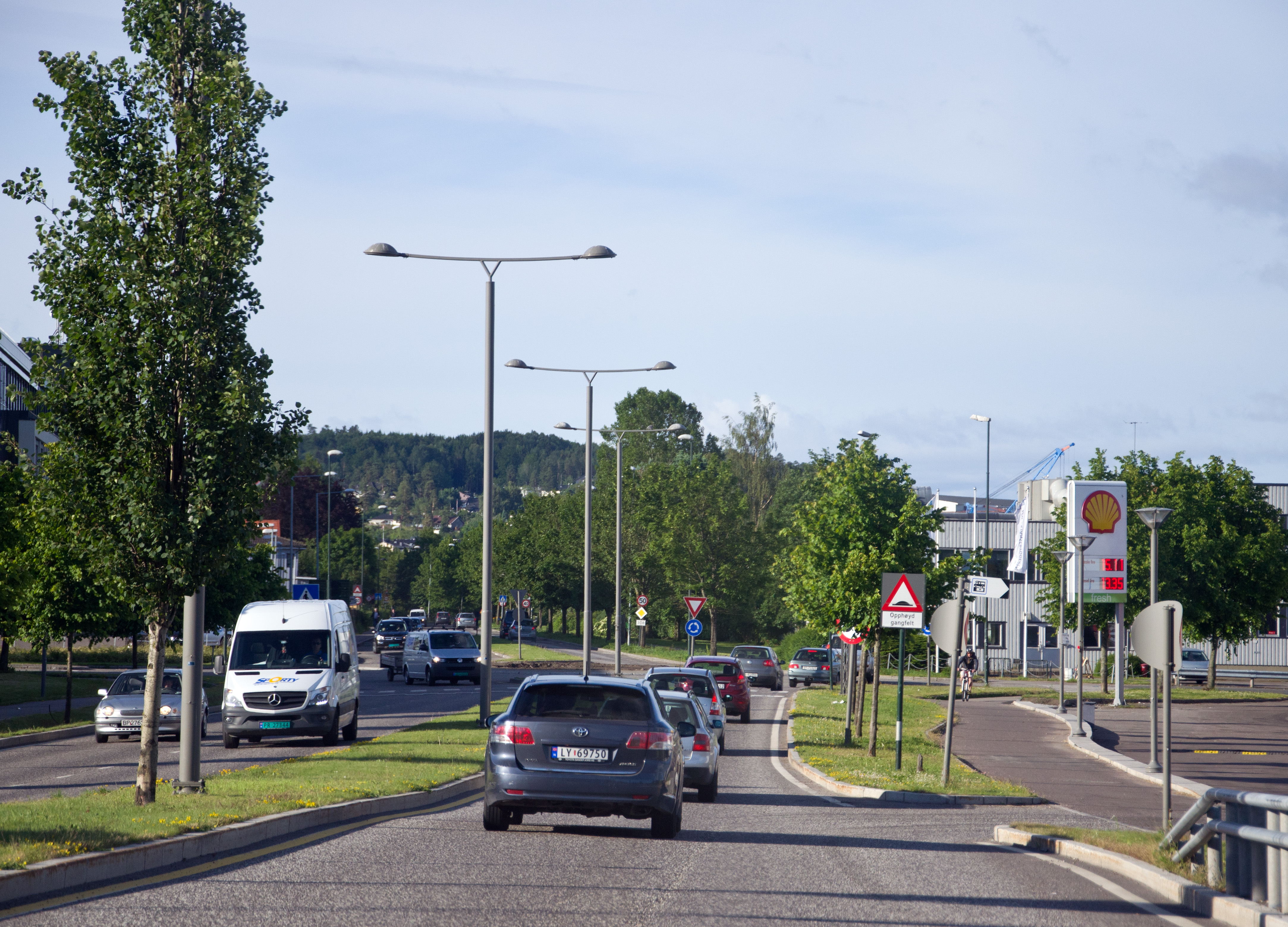 Kjelleveien, Tønsberg